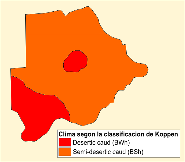 Clima de Botswana segon la classificacion de Koppen.